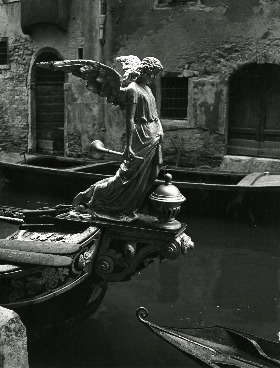 Serie fotografica : Venezia, 1951 / Paolo Monti, Istituto di fotografia Paolo Monti. - Stampe: 4 : Positivo b/n, gelatina bromuro d'argento/ carta, 24x30. - ((Al verso delle stampe iscrizioni inventariali? manoscritte a matita: 3/P8, 4/P8, 5/P8; iscrizione didascalica con data manoscritta a matita: "L'angelo della morte. 1951"; timbri a inchiostro con copyright: "© Copyright/ Credit to/ Paolo Monti/ Corso Sempione [...]/ Milano", "Istituto di Fotografia/ Paolo Monti/ [...] Milano - Via Flavio Vegezio [...]/Milano". - La fotografia identificata P.25 con titolo e data è una ristampa realizzata dall'Istituto di Fotografia Paolo Monti (stampa originale del 1951). - Sul coperchio della scatola iscrizione didascalica manoscritta a pennarello nero: "Venezia". - Fonte: Monografia di Chiesa Butazzi, Grazietta: Venezia e la sua gondola, Milano, Görlich (1974)